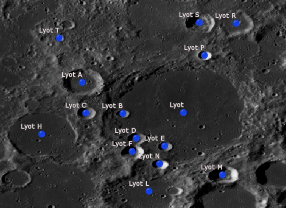 Cráter lunar Lyot. Cráteres satélite. (Imagen LRO)